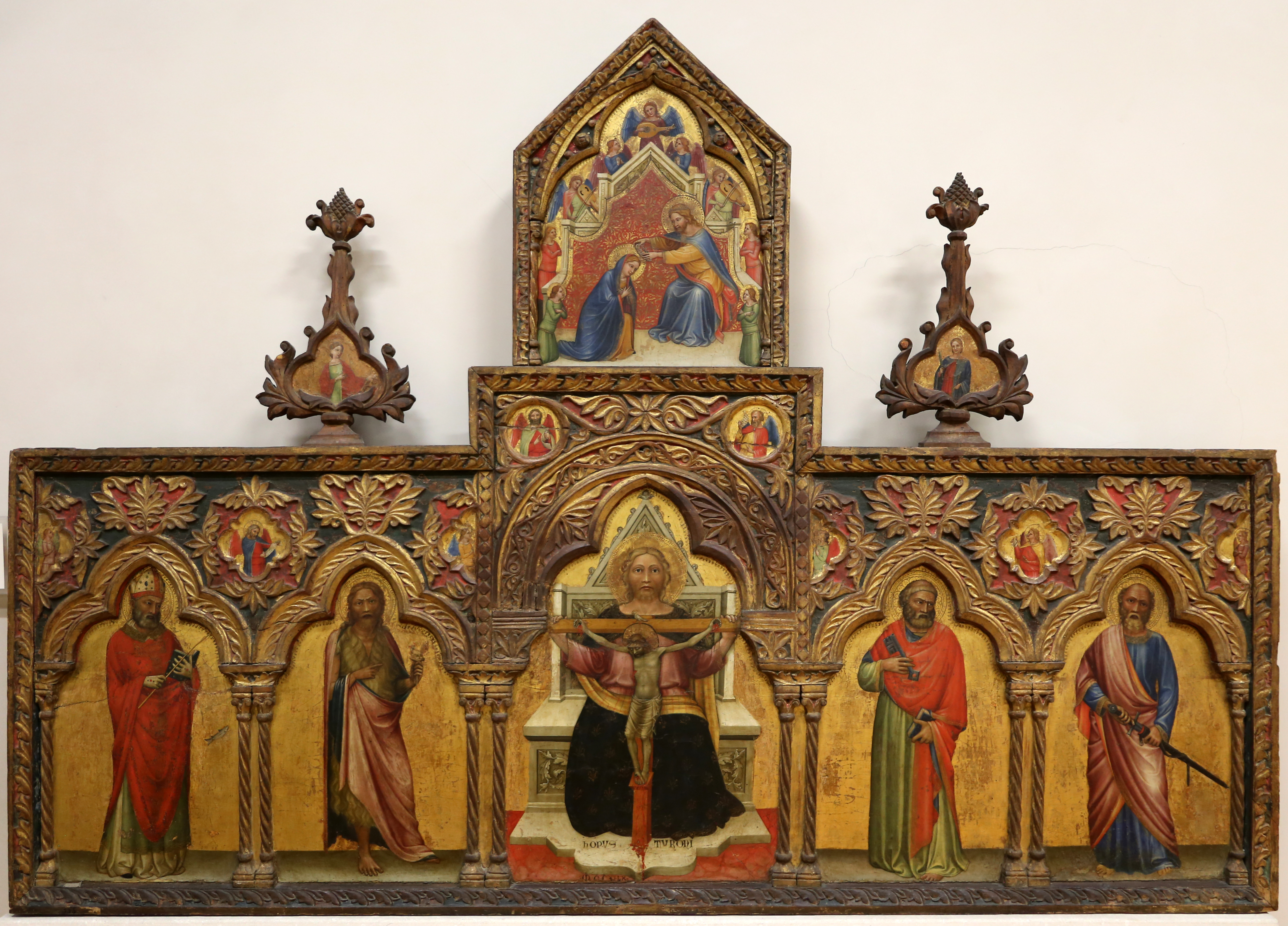 Museo di Castelvecchio This is a photo of a monument which is part of cultural heritage of Italy.